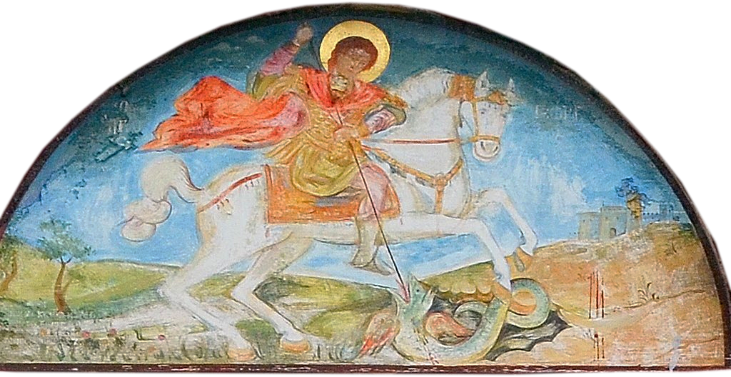 Стенопис в "Свети Георги" в Янешево, Кукушко